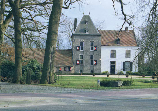 Het Klein Kasteel te Deurne. De donjon is vermoedelijk gebouwd vóór 1383. Vanaf de vijftiende eeuw ook wel "Oud Huis" genoemd, ter onderscheiding van het "Huis te Deurne" (Groot Kasteel) aan de overzijde van de weg (foto: P. Bankers).